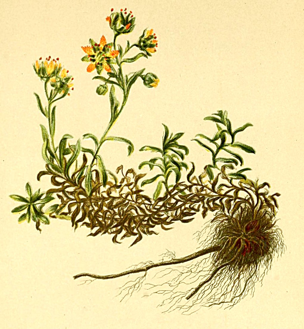 Saxifraga aizoides